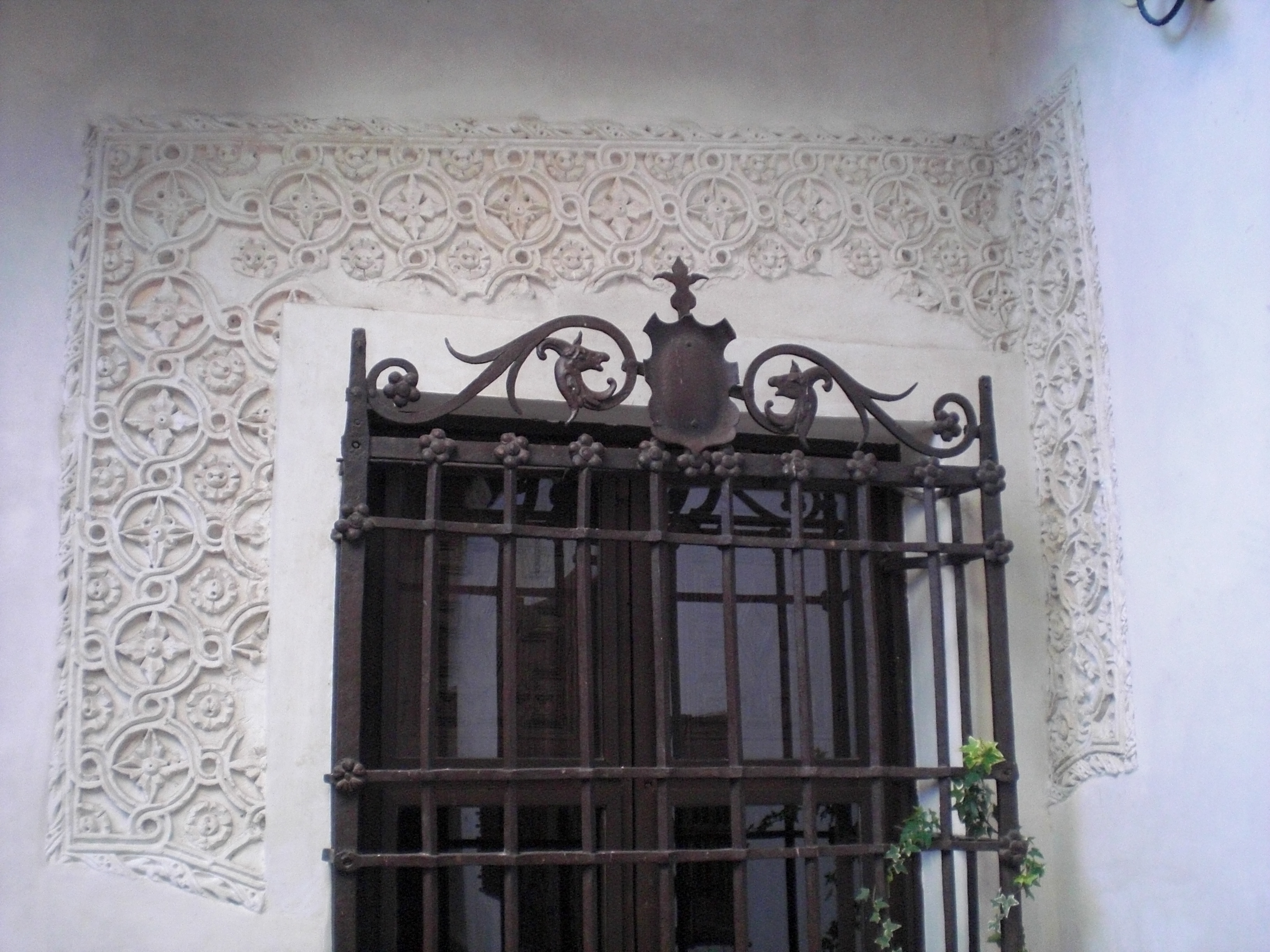 Muzeo El Greko